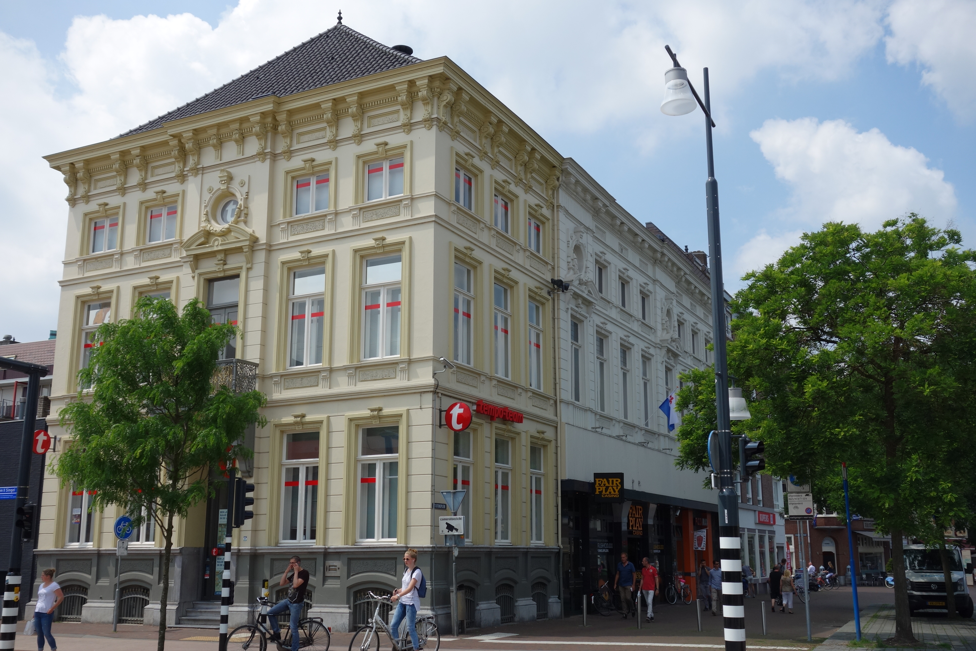 Voormalig herenhuis op de Willem II Singel en Stationsplein 2 in Roermond. De begane grond wordt gebruikt als winkelpand.